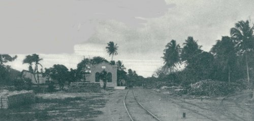 A estação de Soure em 1922 (Revista Ilustração Brasileira, 1922)